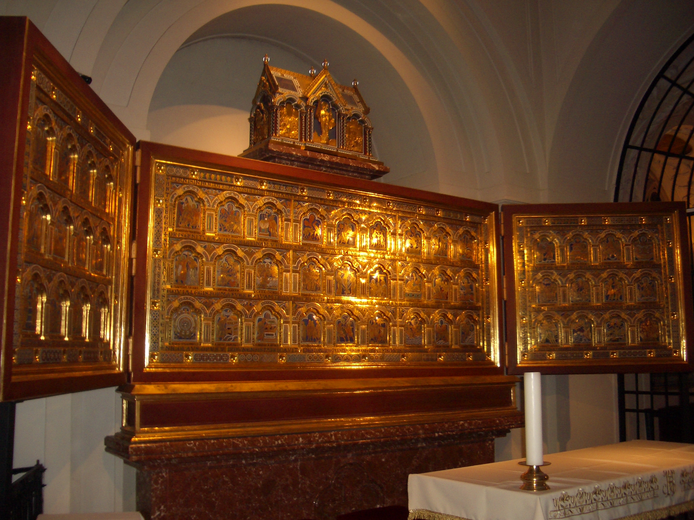 Verdun Altar in Klosterneuburg Abbey